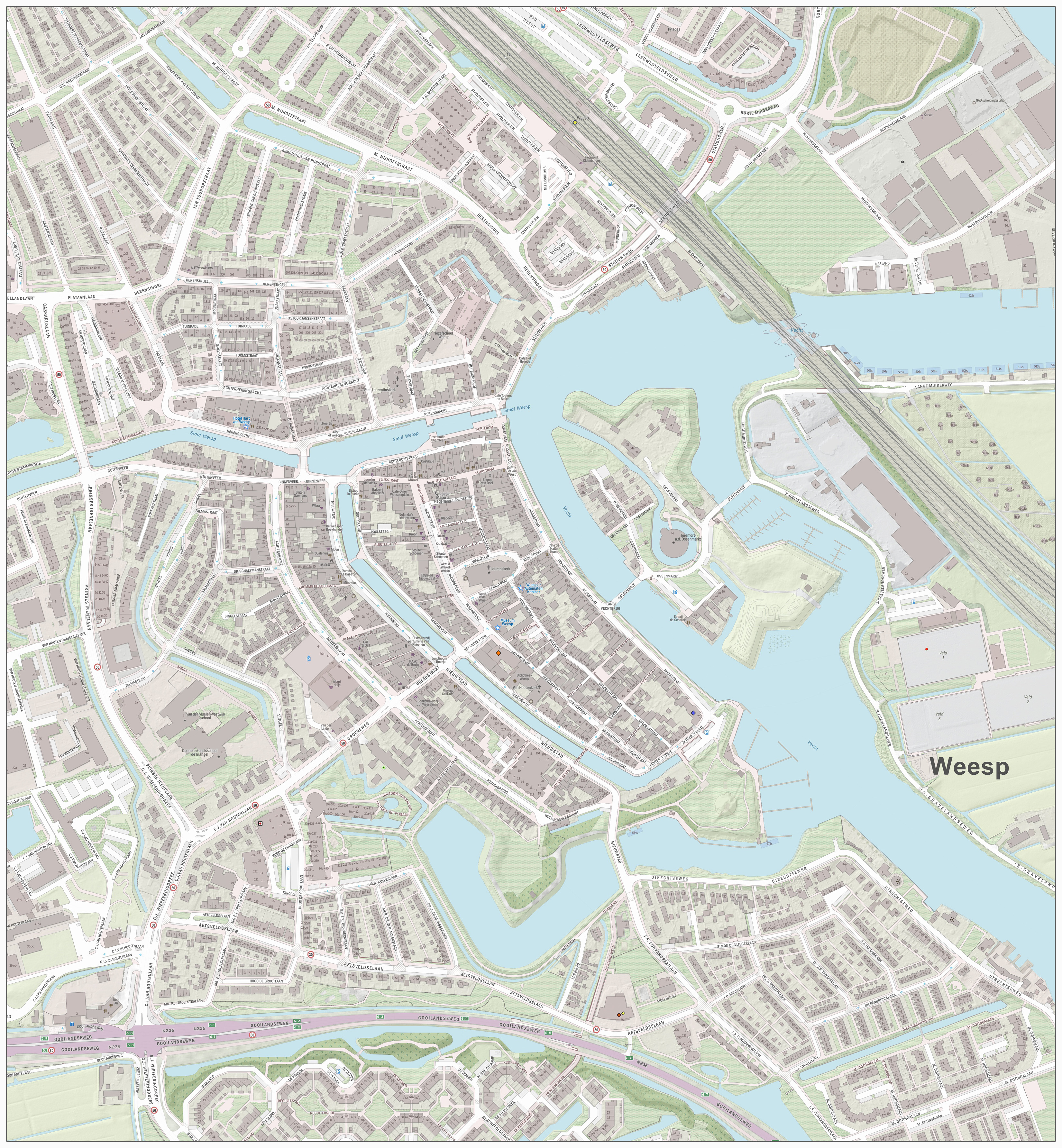 Topografische kaart van Weesp (centrum van woonplaats). Resolutie: 2688 pixels/km. Kaartbeeld samengesteld uit de open geodata van de Basisregistratie Grootschalige Topografie (BGT), Creative Commons-BY Kadaster, en Top10NL en Top25namen (Basisregistratie Topografie, Kadaster), Creative Commons-BY Kadaster. Gebouwvlakken uit open geodata BAG extract, Creative Commons-BY Kadaster. Wegen uit de OpenStreetMap, CC-BY OpenStreetMap bijdragers. Reliëfschaduw uit de Actuele Hoogtekaart AHN2/AHN3. Samenstelling en kleurenschema: Jan-Willem van Aalst, met QGIS2. Zie ook de Legenda.